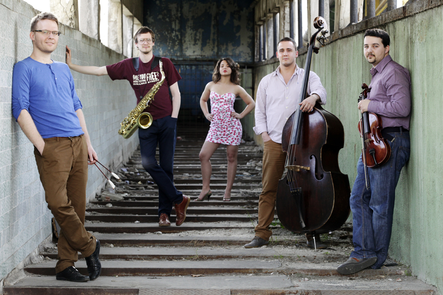 A Tárkány Művek együttes csoportképe. Budapest.